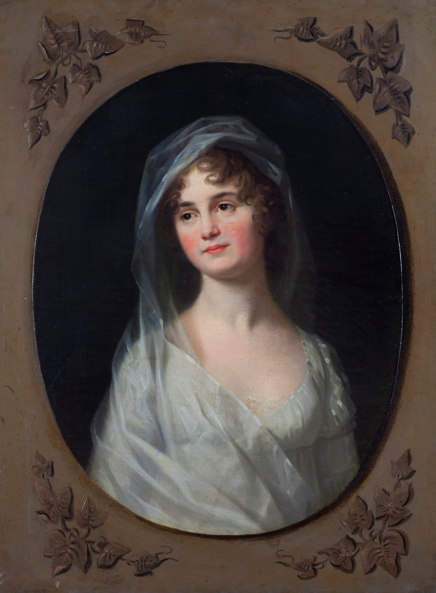 Brustbildnis der Prinzessin Henriette Luise v. Anhalt-Köthen-Pless, geb. v. Holstein-Sonderburg-Beck (1783-1803) im Oval. Sie trägt ein weißes Kleid mit weitem Dekoltee und darüber ein Seidentuch, das ebenfalls über den leicht zur Seite geneigten Kopf geführt ist. Die Prinzessin heiratete am 20. August 1803 den Prinzen Ferdinand v. Anhalt-Köthen-Pless. Sie verstarb bereits drei Monate nach der Hochzeit. Das Bild entstand posthum, daher gleitet ihr Blick wehmütig aus dem Bild